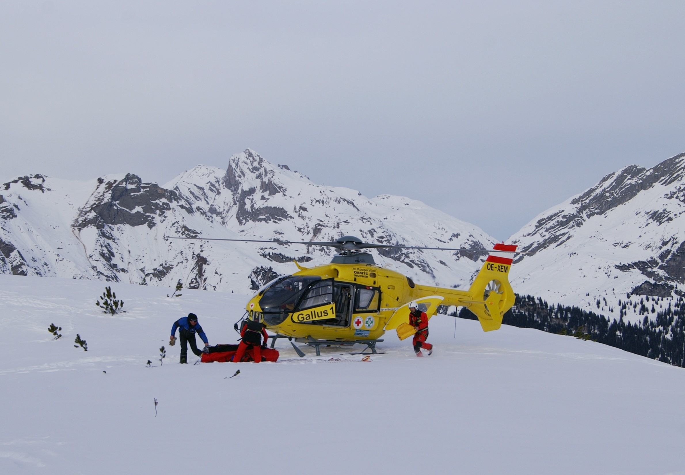 Taubergung mit Bergesack [1] durchgeführt von der Firma Wucher [2] im Bereich Untermurich unterhalb vom Sonnenkopf in Cooperation mit dem ÖAMTC im Skigebiet der Sonnenkopfbahnen in Klösterle, Vorarlberg. “Technische Daten Helicopter”: [3] 6.) Vorbereitung zur Erstversorgung .